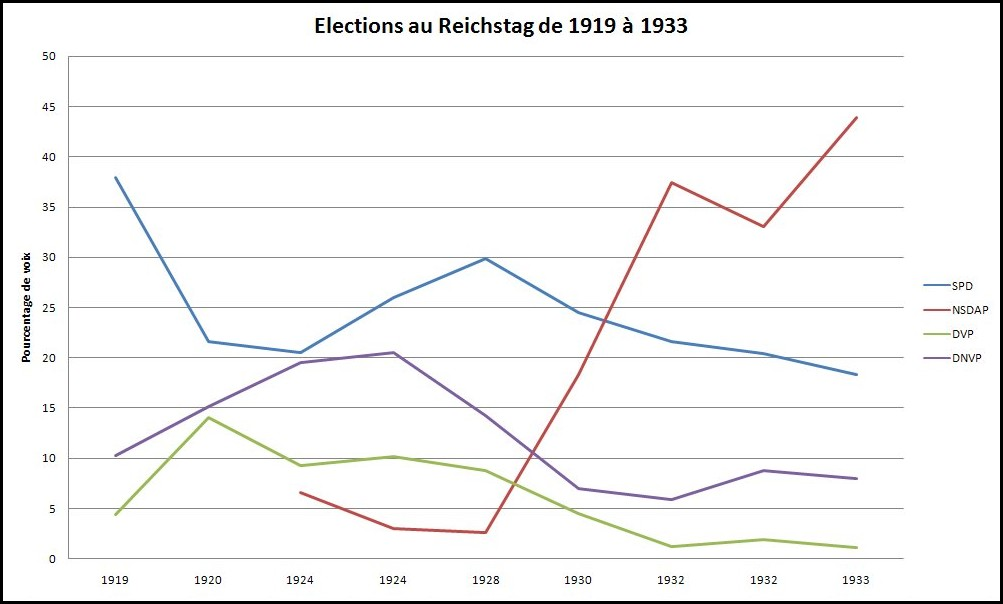 Graphique des élections au Reichstag 1919-1933 pour le SPD, DVP, DNVP et NSDAP